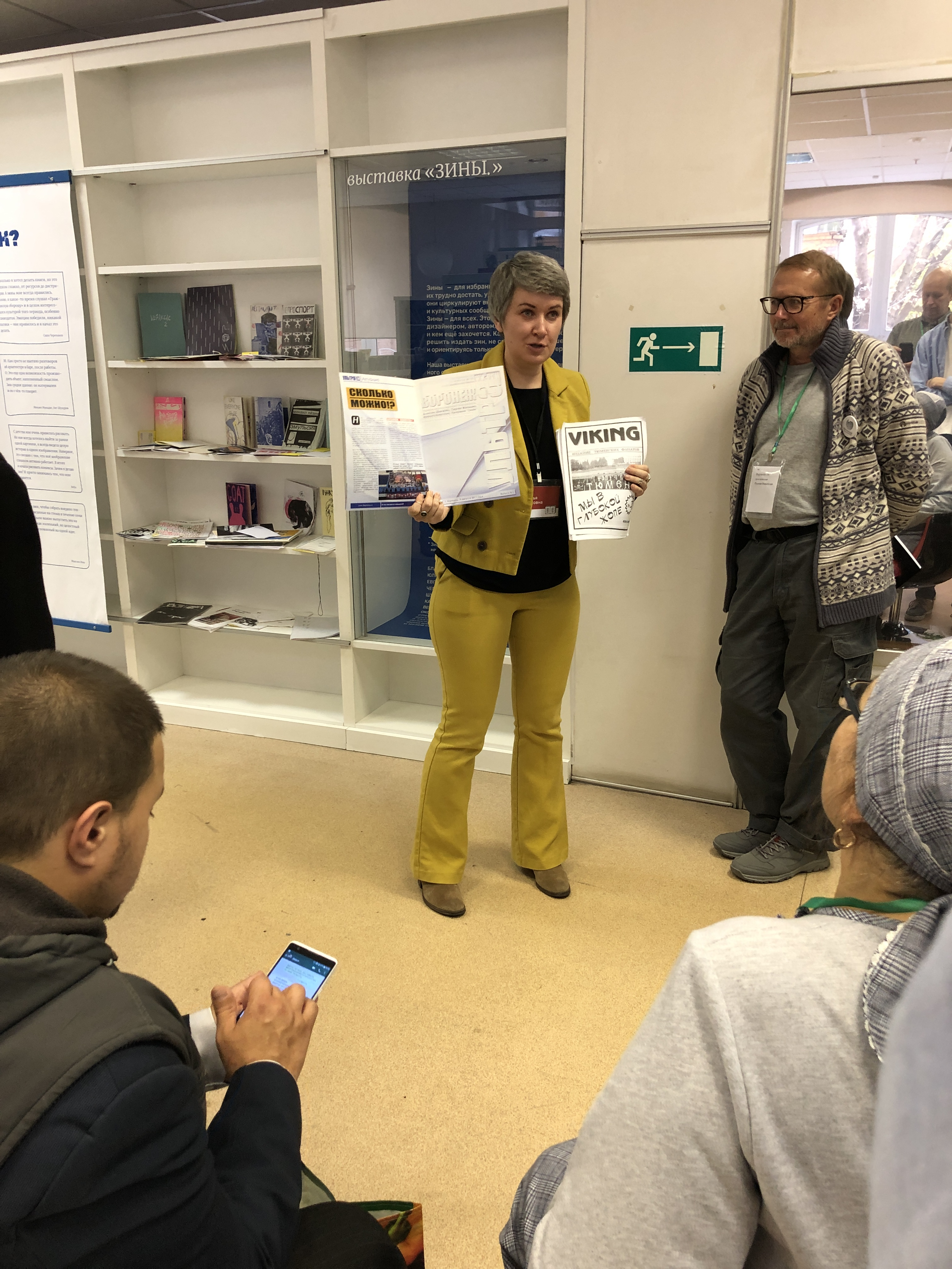 Наталья Сенаторова (Библиотека имени Н. А. Некрасова)